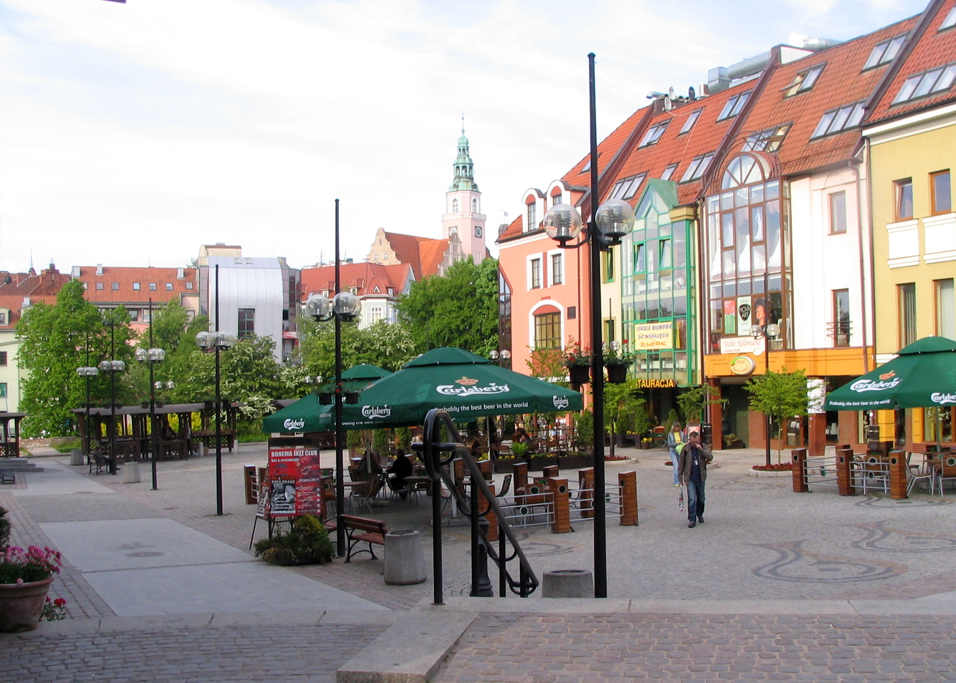 Targ Rybny w Olsztynie